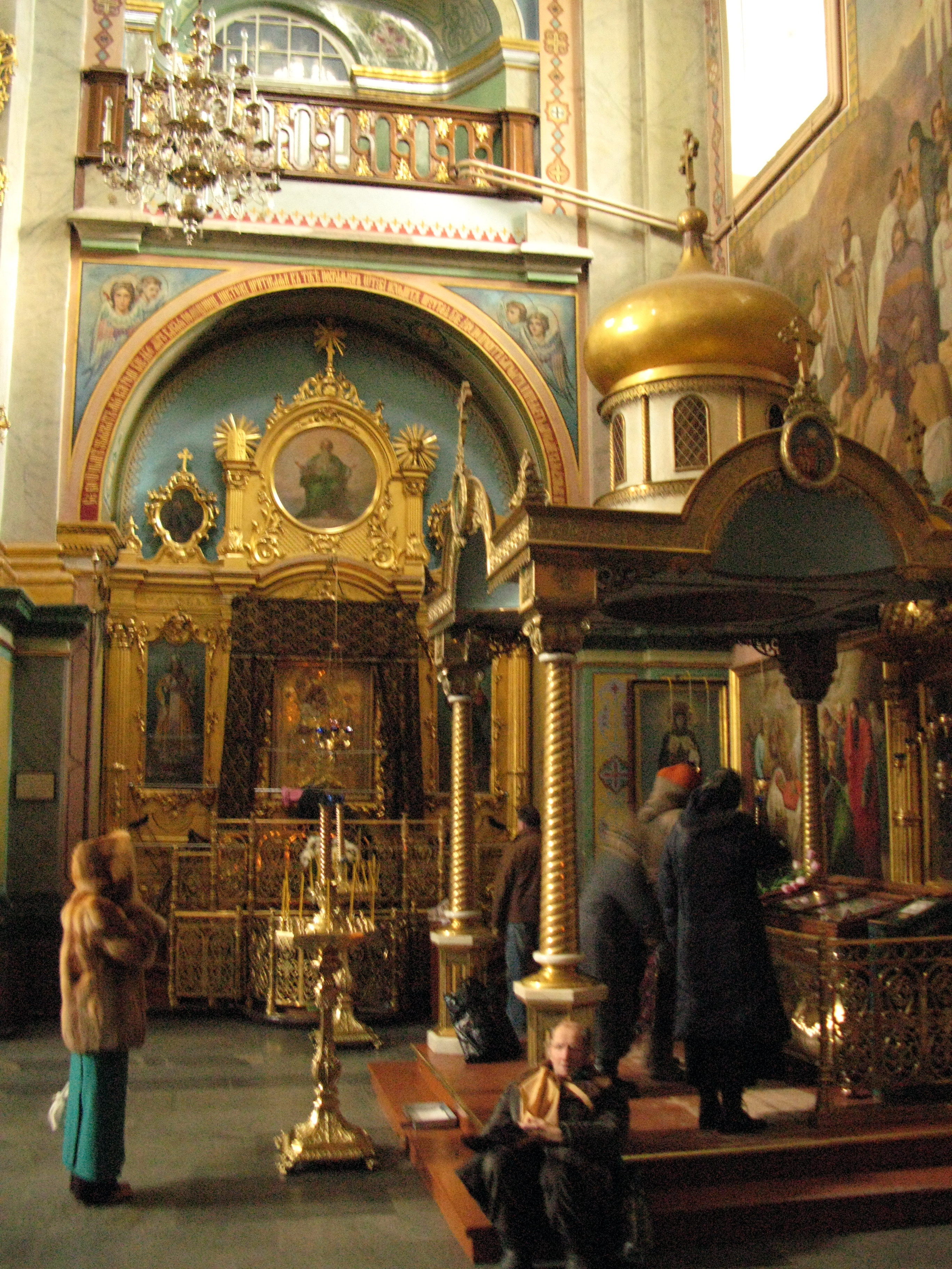 Успенський собор, бічний вівтар, Почаїв, пл. Возз'єднання